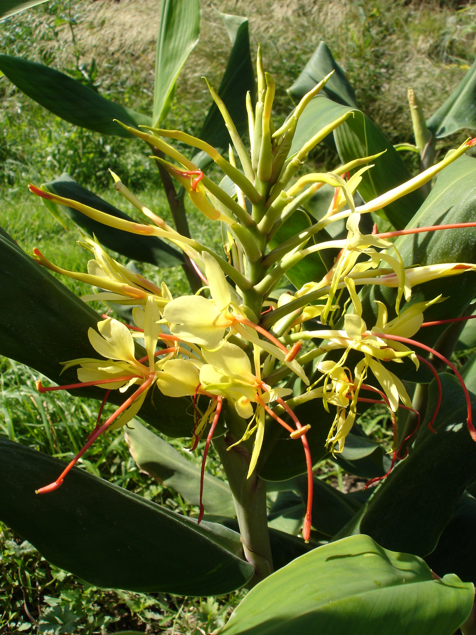 Description: Hedychium gardnerianum, Jardin des Plantes de Paris, septembre 2005. Source: Bouba